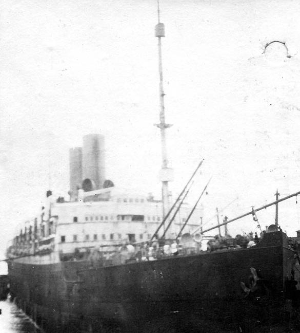 USS Prinz Friedrich Wilhelm, NYC harbor